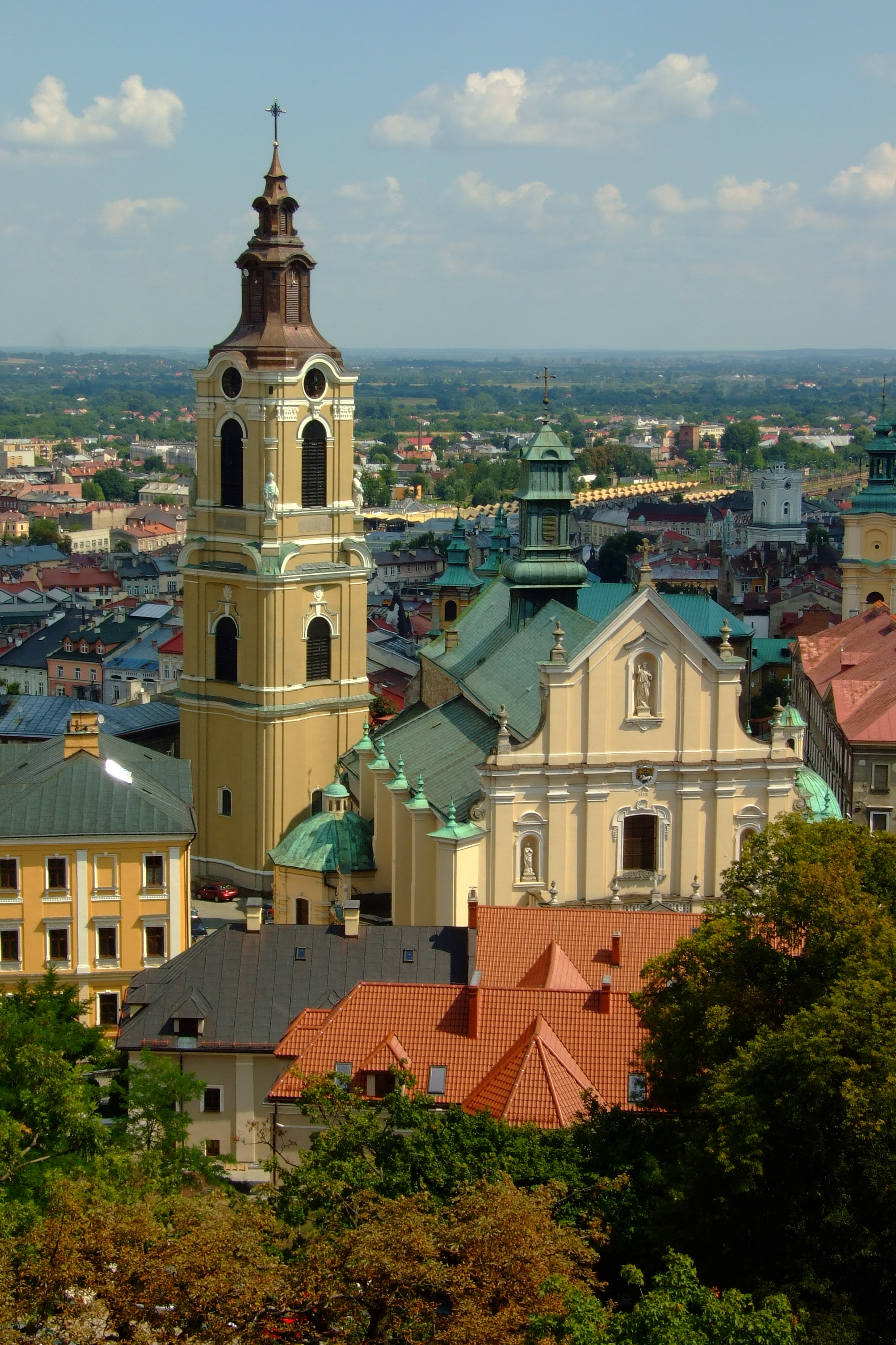 Przemyśl - Bazylika archikatedralna p.w. Wniebowzięcia NMP